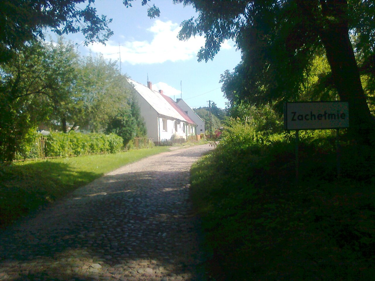 Zachełmie - gmina Łobez